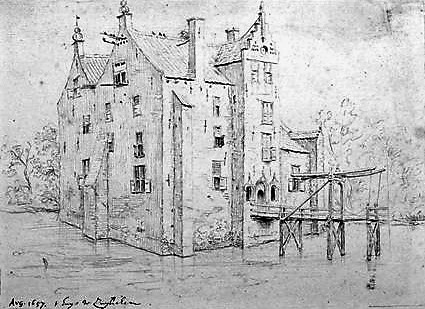 Afbeelding kasteel Zuilichem met grachten en ophaalbrug. Potloodtekening, 1657 toegeschreven aan C. Huygens Jr. Watermerk van een joker er in. Opschriften: l.o. "'t huijs te Zuylichem" in ander schrift: "Aug. 1657"